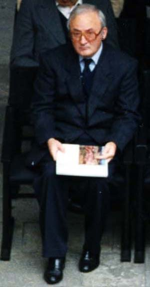 Juan Mari Lekuona 1989an